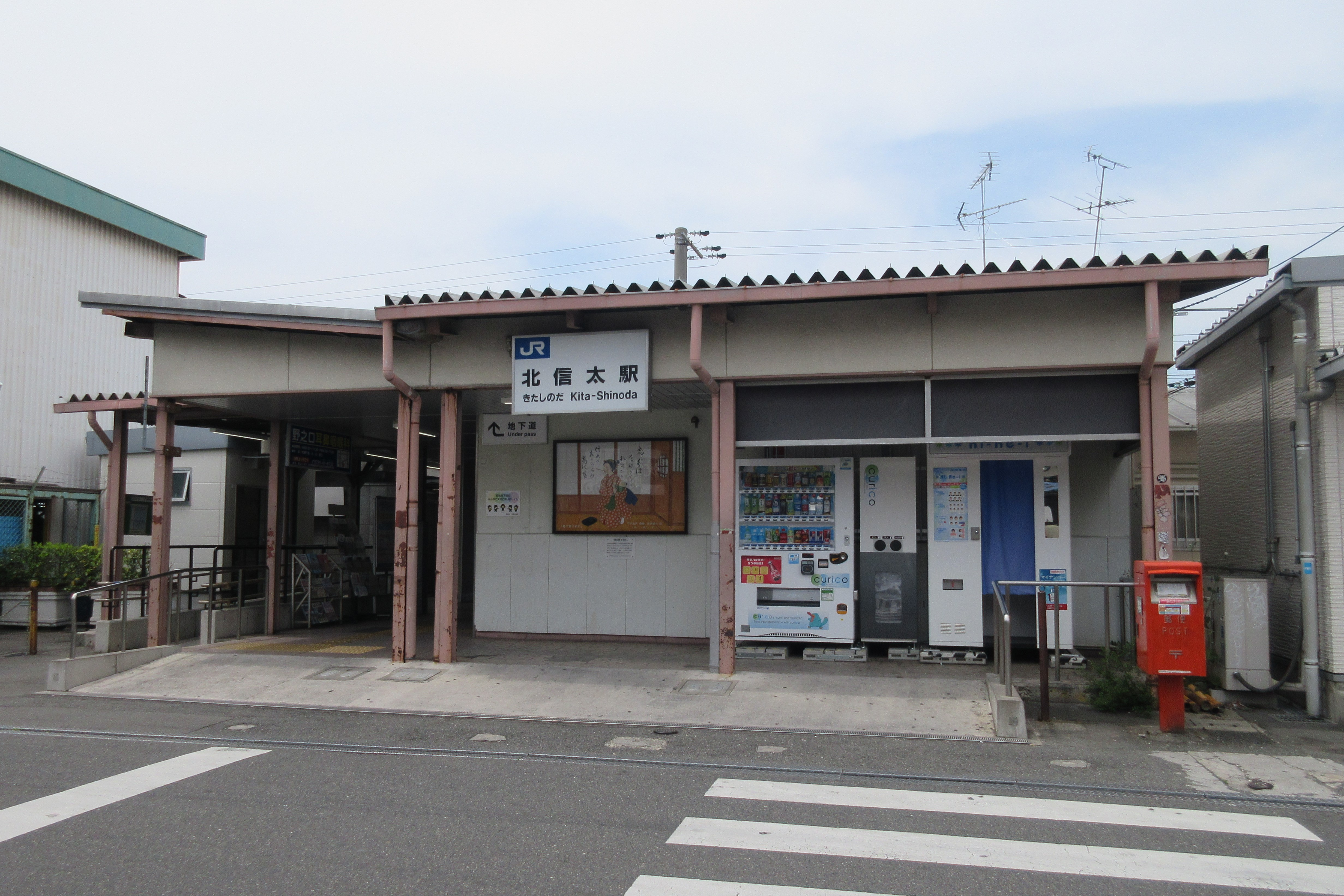 JR北信太駅